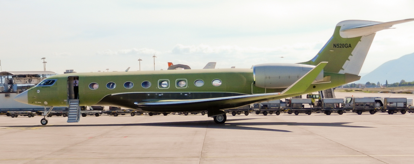 Gulfstream G650 experimental aircraft